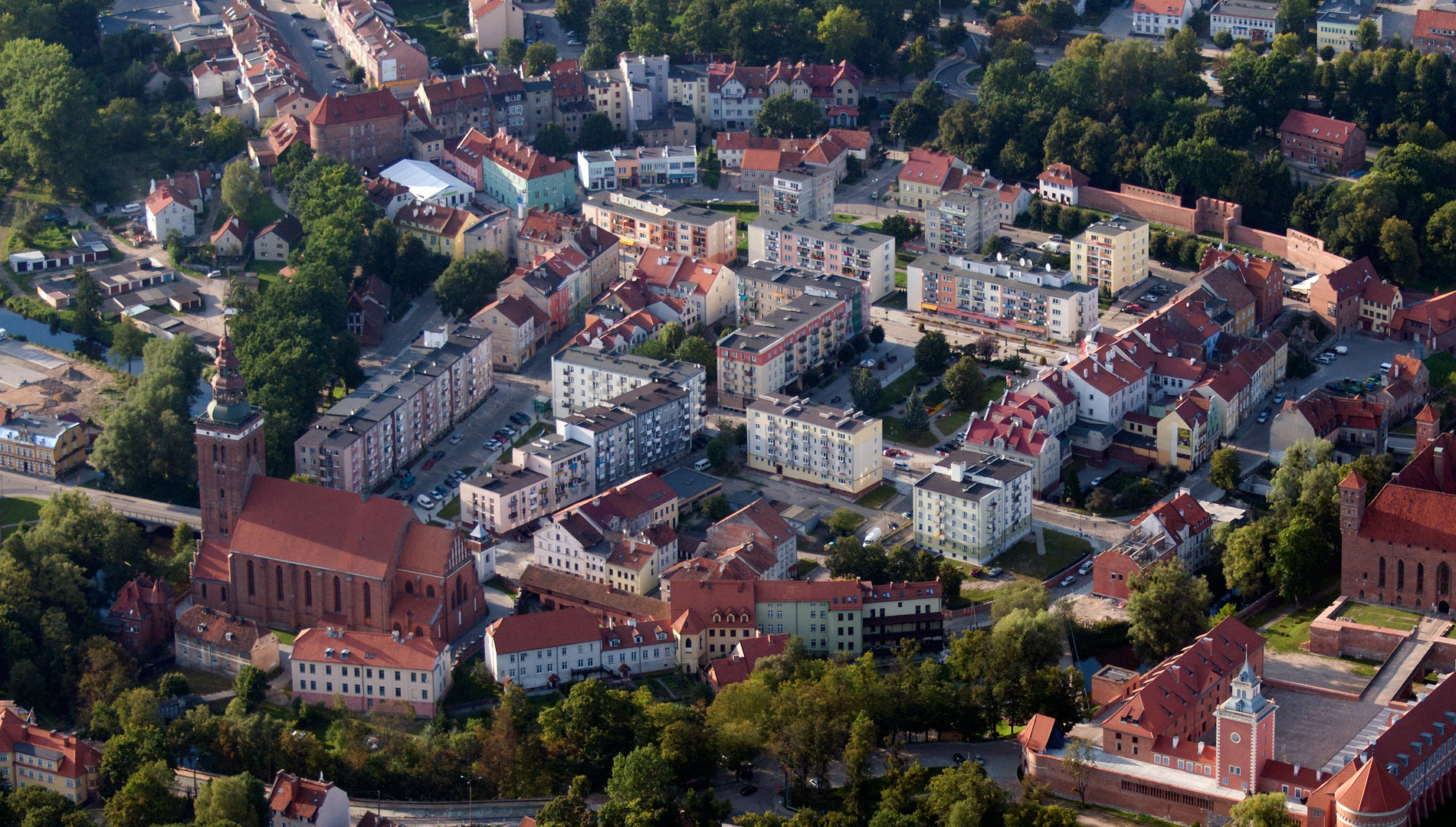 układ urbanistyczny (50 - 200 m. od murów miejskich) dom, ul. Wyszyńskiego 5 dom, ul. Wyszyńskiego 7 dom, ul. Klasztorna 2 dom, ul. Kajki 2 dom, ul. Kajki 3 dom, ul. Kajki 5 dom, ul. Kajki 7 dom, ul. Kajki 9 dom, ul. Kajki 10 dom, ul. Kajki 11 dom, ul. Kajki 13 dom, ul. Kajki 14 kamienica, ul. Wysokiej Bramy 4 kamienica, ul. Wysokiej Bramy 8 kamienica, ul. Wysokiej Bramy 10 kamienica, ul. Wysokiej Bramy 12 kamienica, ul. Wysokiej Bramy 14 kamienica, ul. Wysokiej Bramy 16 kamienica, ul. Wysokiej Bramy 18 kamienica, ul. Wysokiej Bramy 20 dom, ul. Hoża 13b Lidzbark Warmiński, Lidzbark Warmiński (gmina miejska)